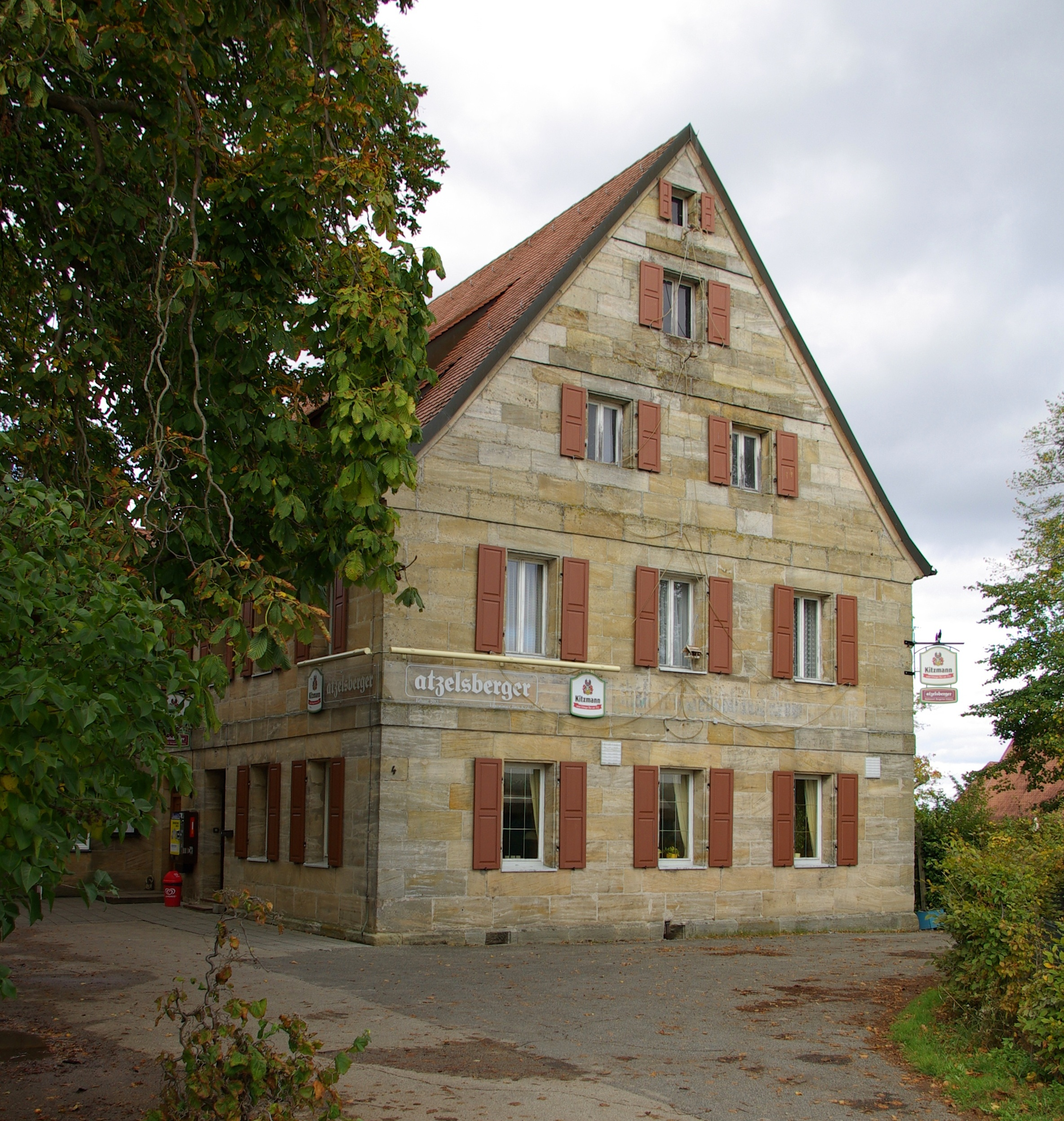 Restaurant atzelsberger in Atzelsberg (Gemeinde Marloffstein).